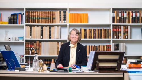 Prof. Dr. Martina Hartmann; Praesidentin Monumenta Germaniae Historica; fografiert am 29.10.2018; Foto: © Astrid Eckert, Muenchen; ; fon: +49 171 26 89 601